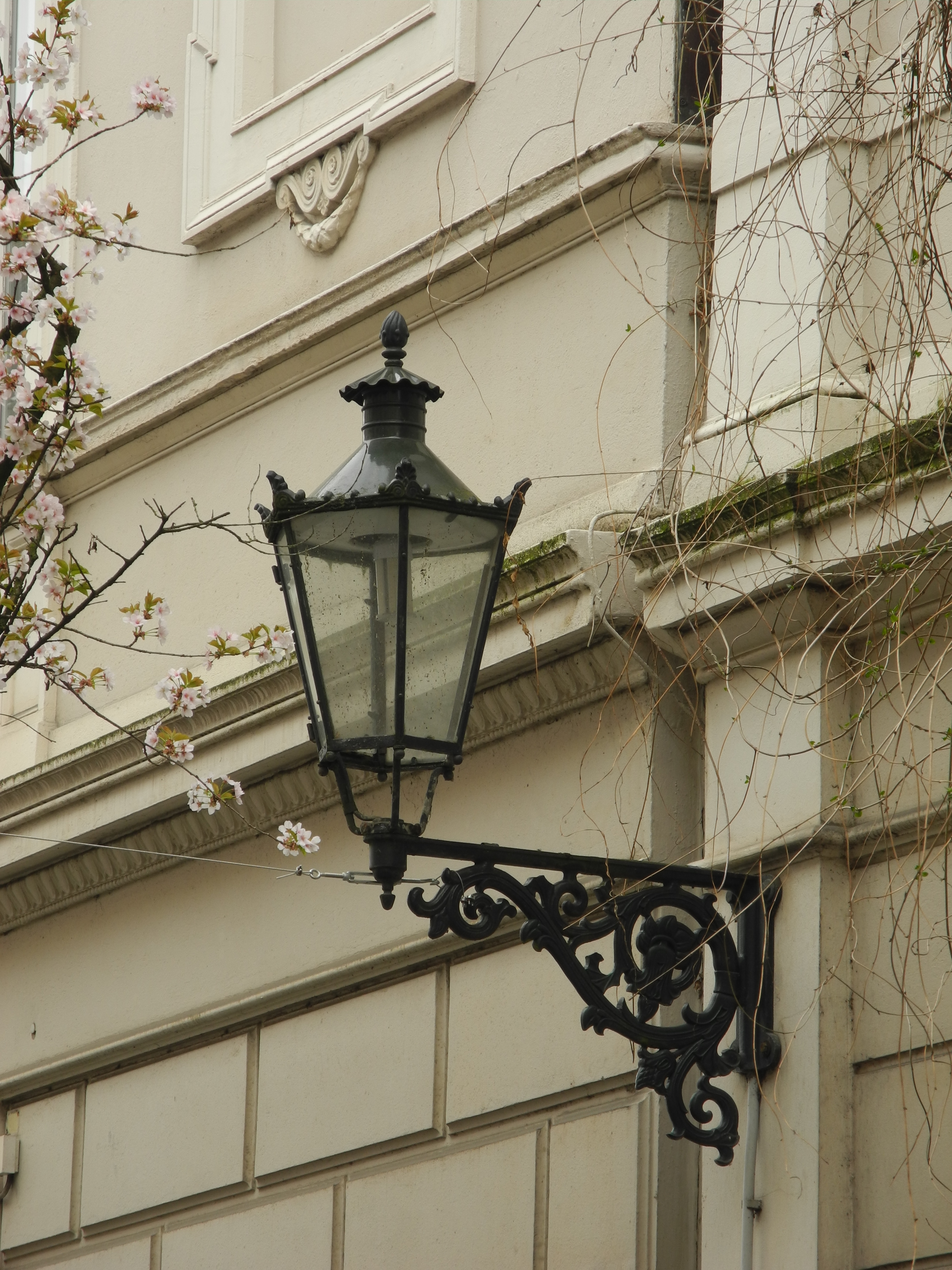 Wuppertal, Wohnquartier Elberfeld-Mitte, Luisenstr. westl. Einmündung Untergrünewalder Straße, Straßenlaterne